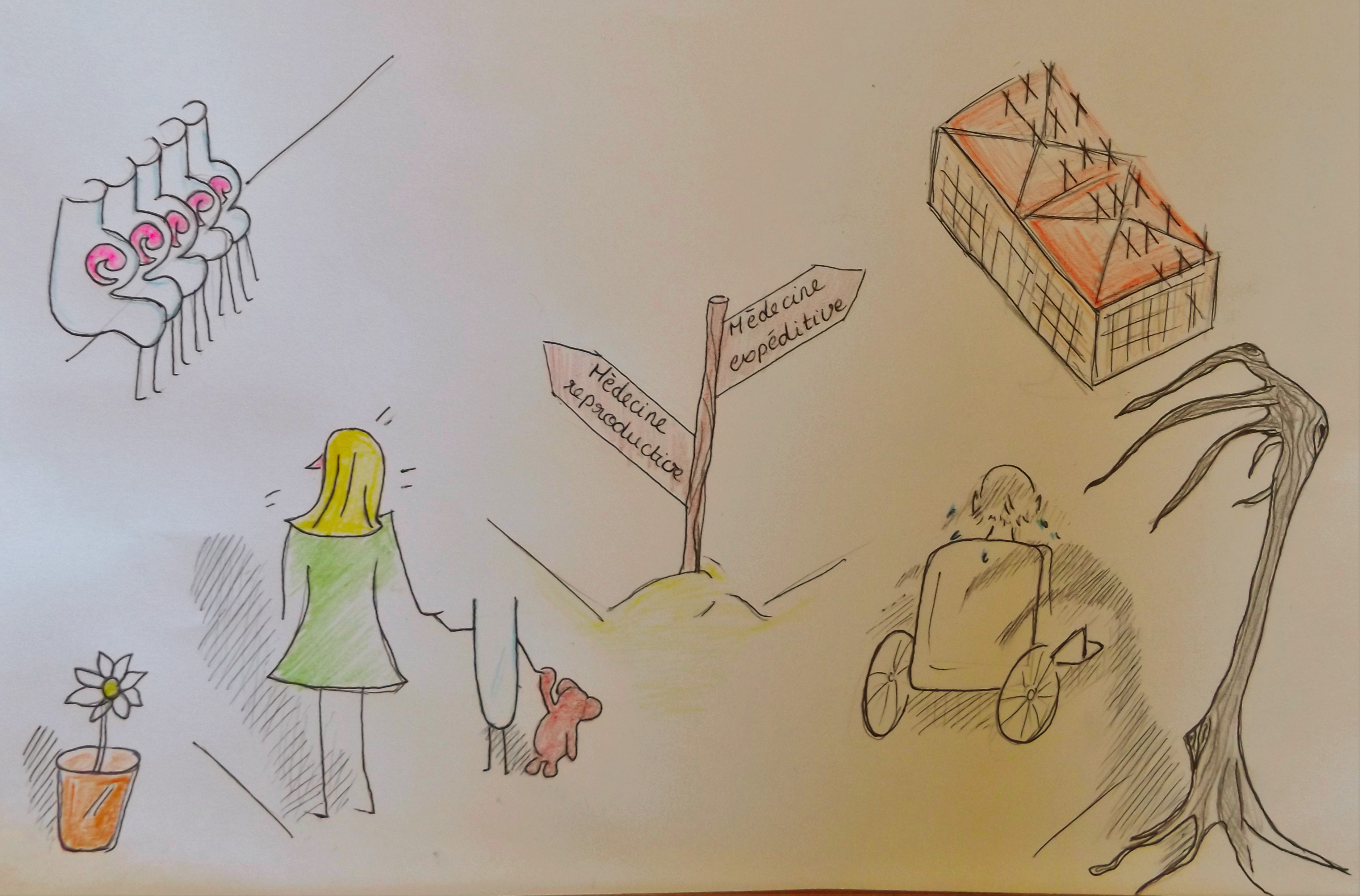 Représentation de deux aspects de la bioéthique qui sont souvent sujet à la critique : la médecine reproductive et la médecine expéditive.